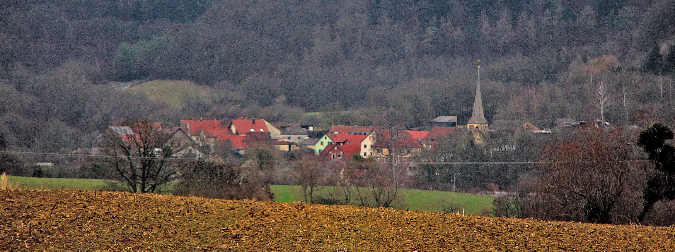 Altershausen, Ortsteil von Königsberg in Bayern, vom Westen aus gesehen.